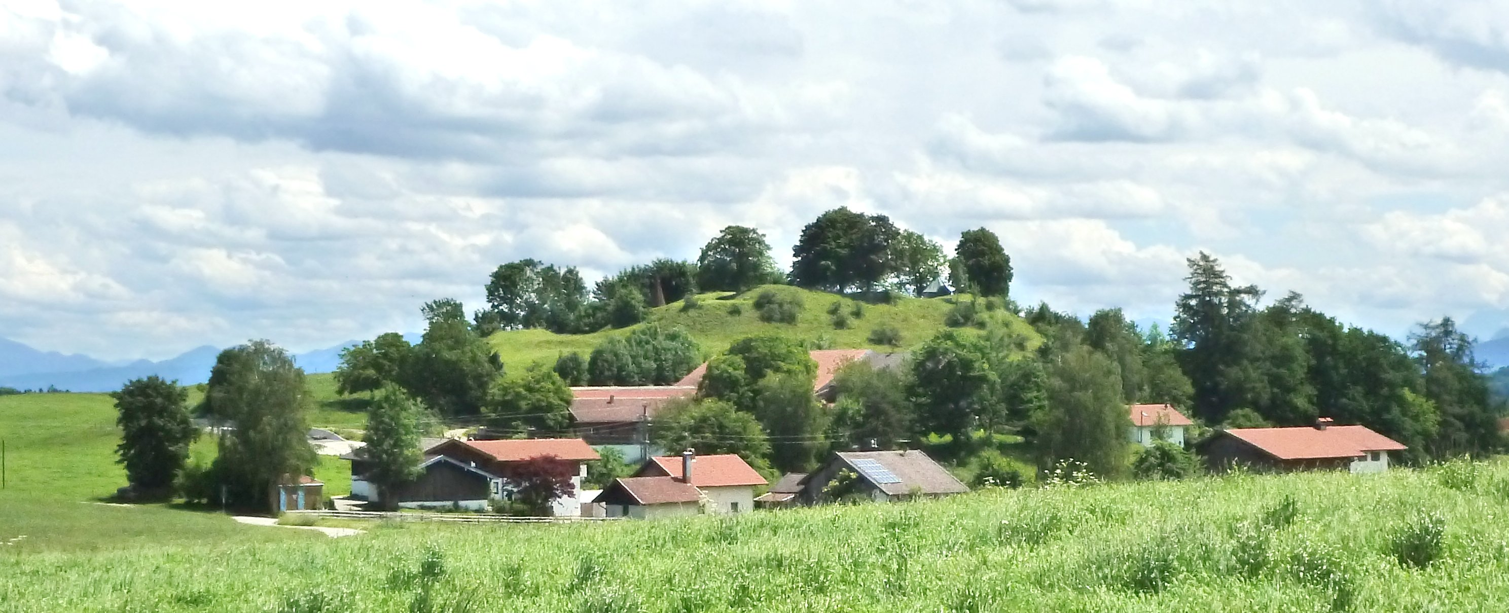 Schlossberg von Tettelham bei Otting, Gemeinde Waging. Reste der Burg, spätmittelalterlich; nordwestlich von Tettelham oberhalb des Hofbauer-Anwesens. - Im südlichen Bereich der Burgruine Kriegergedächtniskapelle, achteckiger Zentralbau mit Vorbau, errichtet 1946/47.